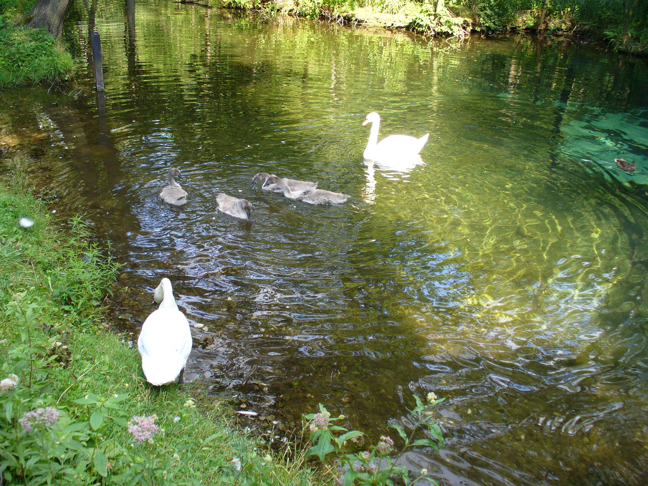 Rezerwat przyrody Niebieskie Źródła